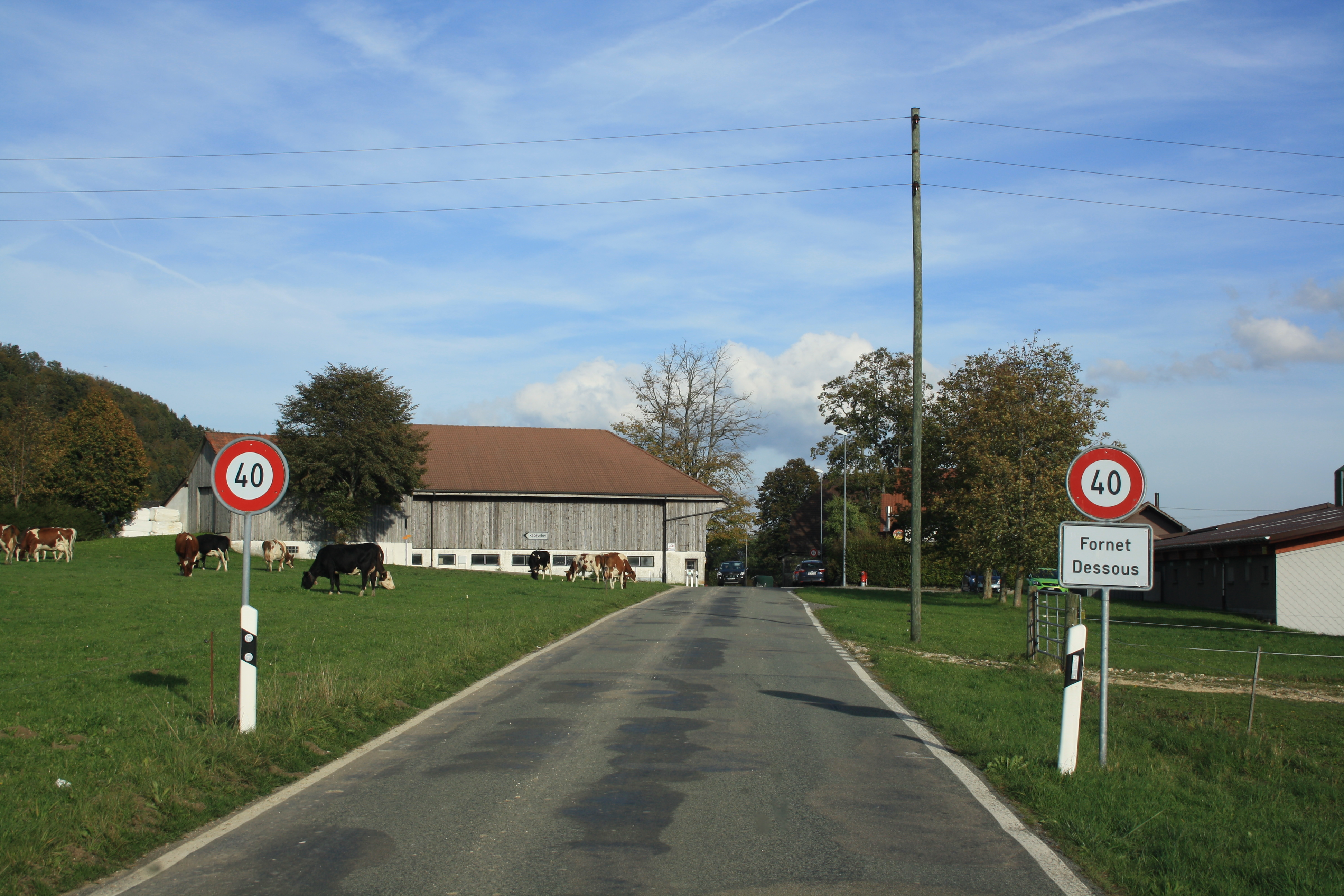 Fornet-Dessous